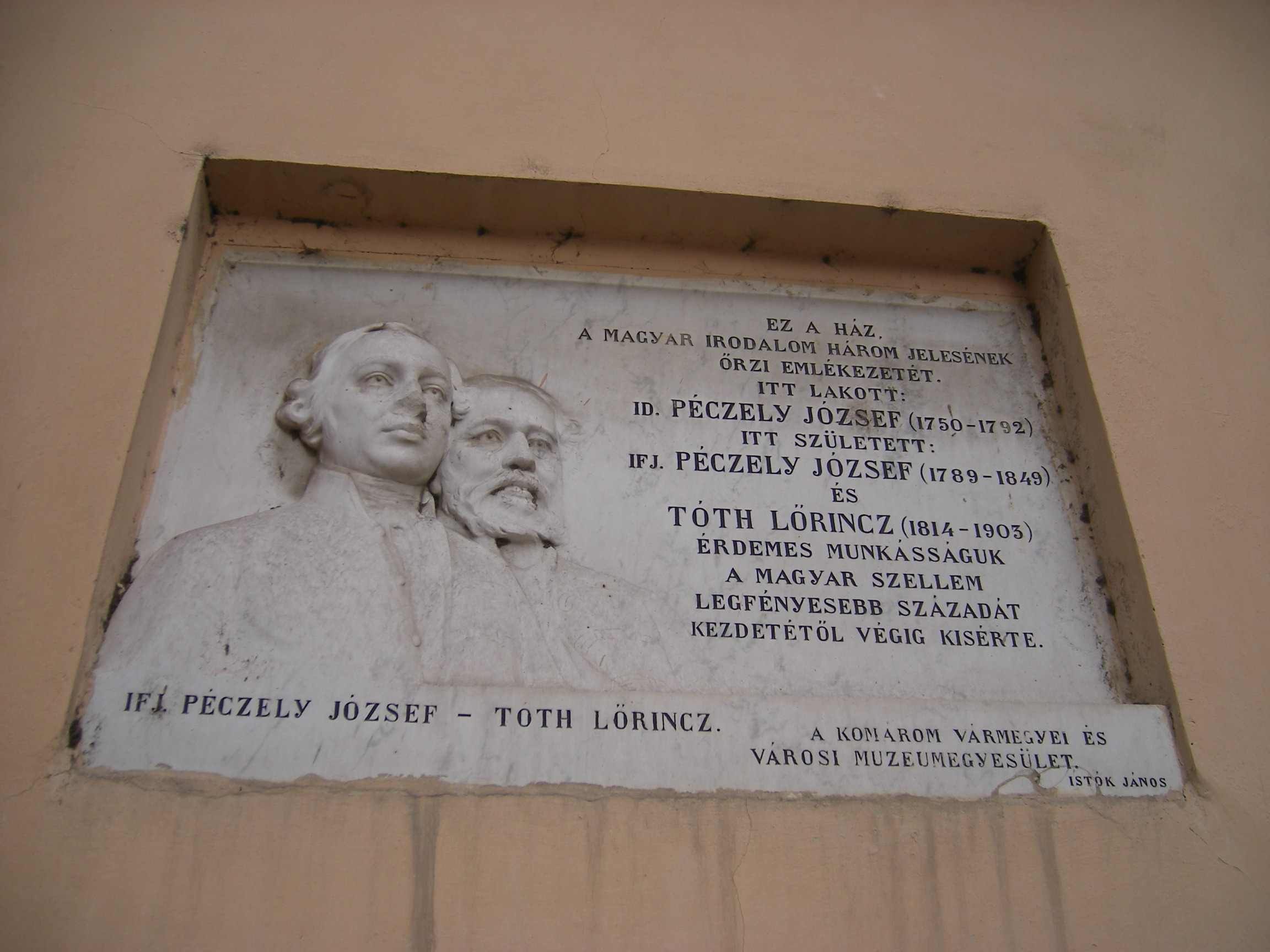 Komárom - a két Péczely József és Tóth Lőrinc emléktáblája a Ferencesek utcájában 1904-ből